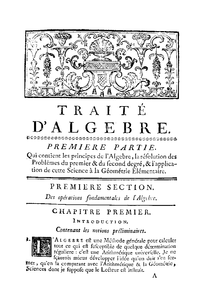 Traité d'algebre et de la maniere de l'appliquer. Traduit de l'anglois de m. MacLaurin, ... Avec des augmentations tirées des mathématiciens les plus célébres. - A Paris, rue Dauphine : chez Charles-Antoine Jombert, libraire du roi pour l'artillerie & le génie, à l'image Notre-Dame, 1753 ([Parigi] : de l'imprimerie de J. Chardon). - viij, 418, [6] p., 13 c. di tav. ripiegate : ill. calcografiche ; 4º .